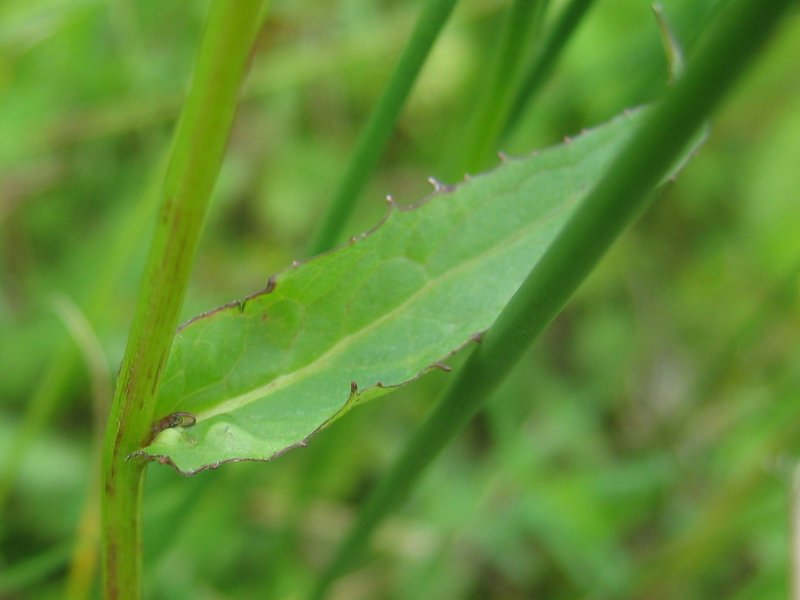 Sumpf-Pippau (Crepis paludosa), Gragetopshof